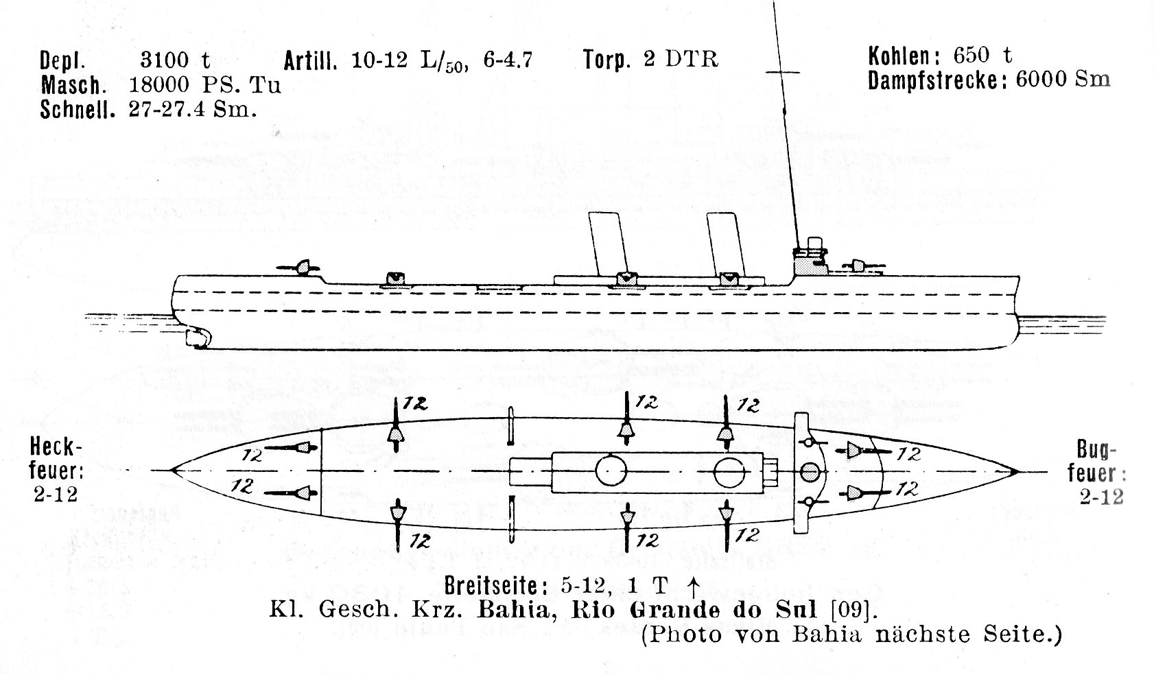 Brasilianischer Kleiner Geschützter Kreuzer BAHIA (1910 bis 1945), Aufriß